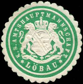 Sealing stamp Title: Königlich Sächsische Amtshauptmannschaft - Löbau Description: grün, weiß, geprägt Place: Löbau size: 3 cm